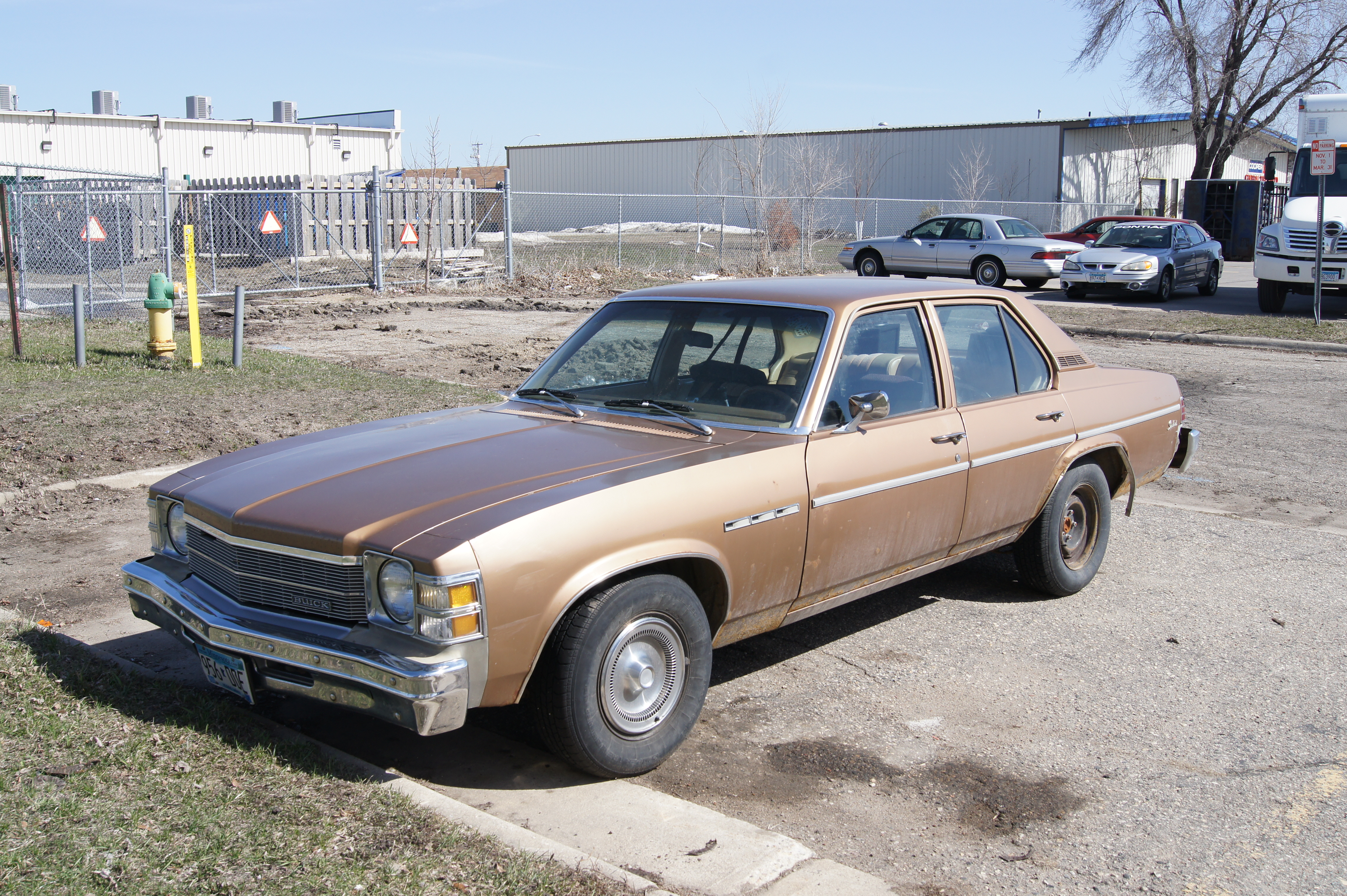 1976 Buick Skylark